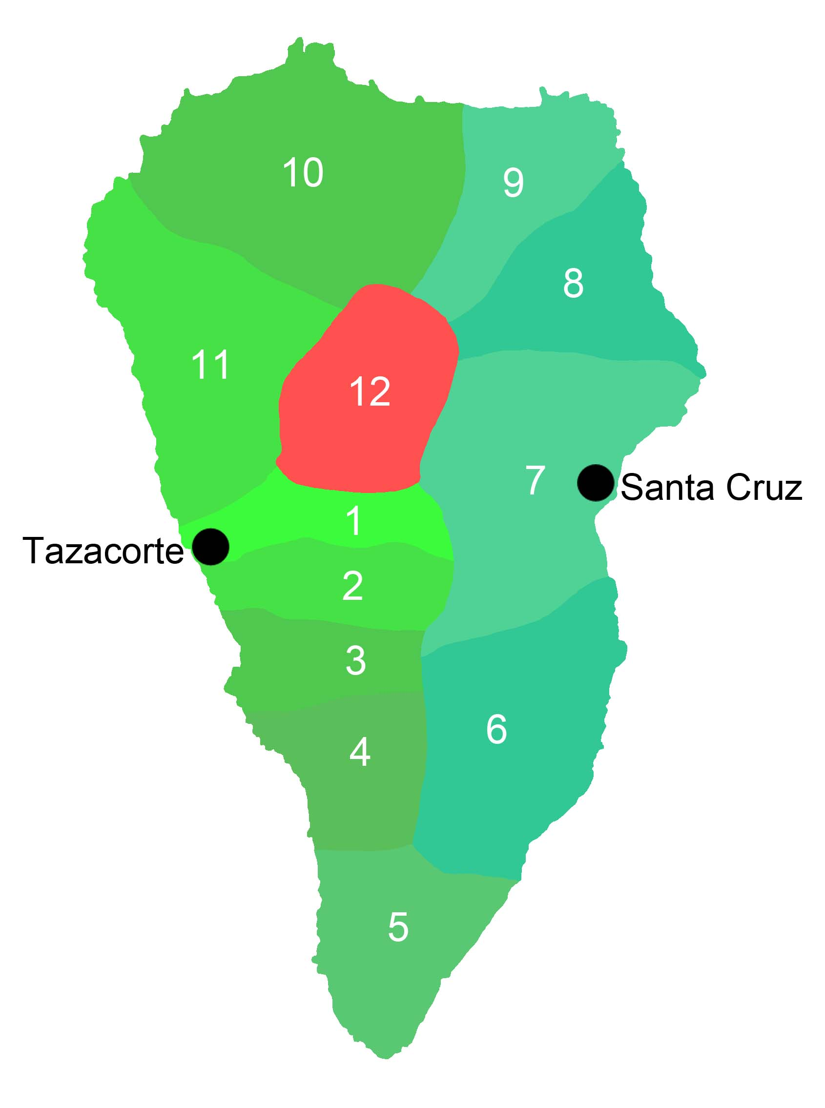 Herrschaftsgebiete auf der Insel La Palma im Jahr 1492 1 Aridane, 2 Tihuya, 3 Tamanca, 4 Ahenguareme, 5 Tigalate, 6 Tedote, 7 Tenagua, 8 Adeyajamen, 9 Tagaragra, 10 Tagalgen, 11 Tijarafe, 12 Aceró Vorlage: Mauro S. Hernández Pérez: Contribución a la Carta Arqueológica de la isla de la Palma (Canarias). In: Anuario de Estudios Atlánticos. Nr. 18, 1972, ISSN 0570-4065, S. 548